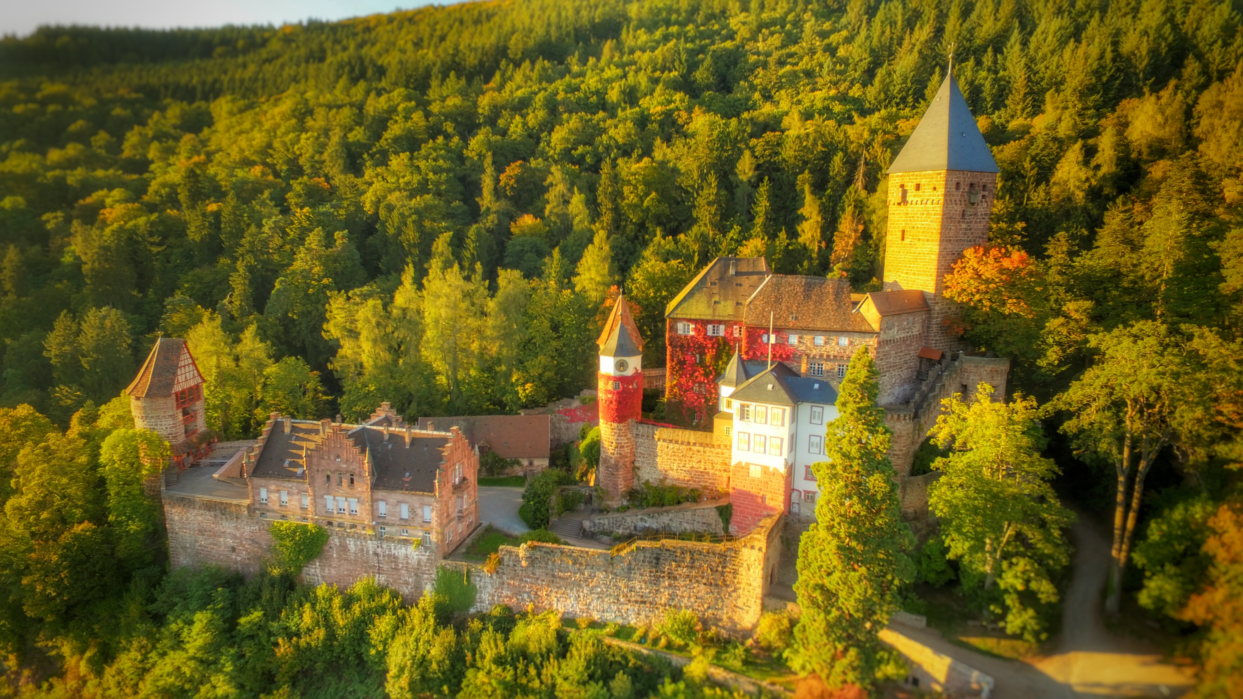 Sonnenuntergang auf die Burg im Herbst